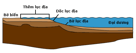 Rìa lục địa gồm thềm lục địa, dốc lục địa và bờ lục địa.